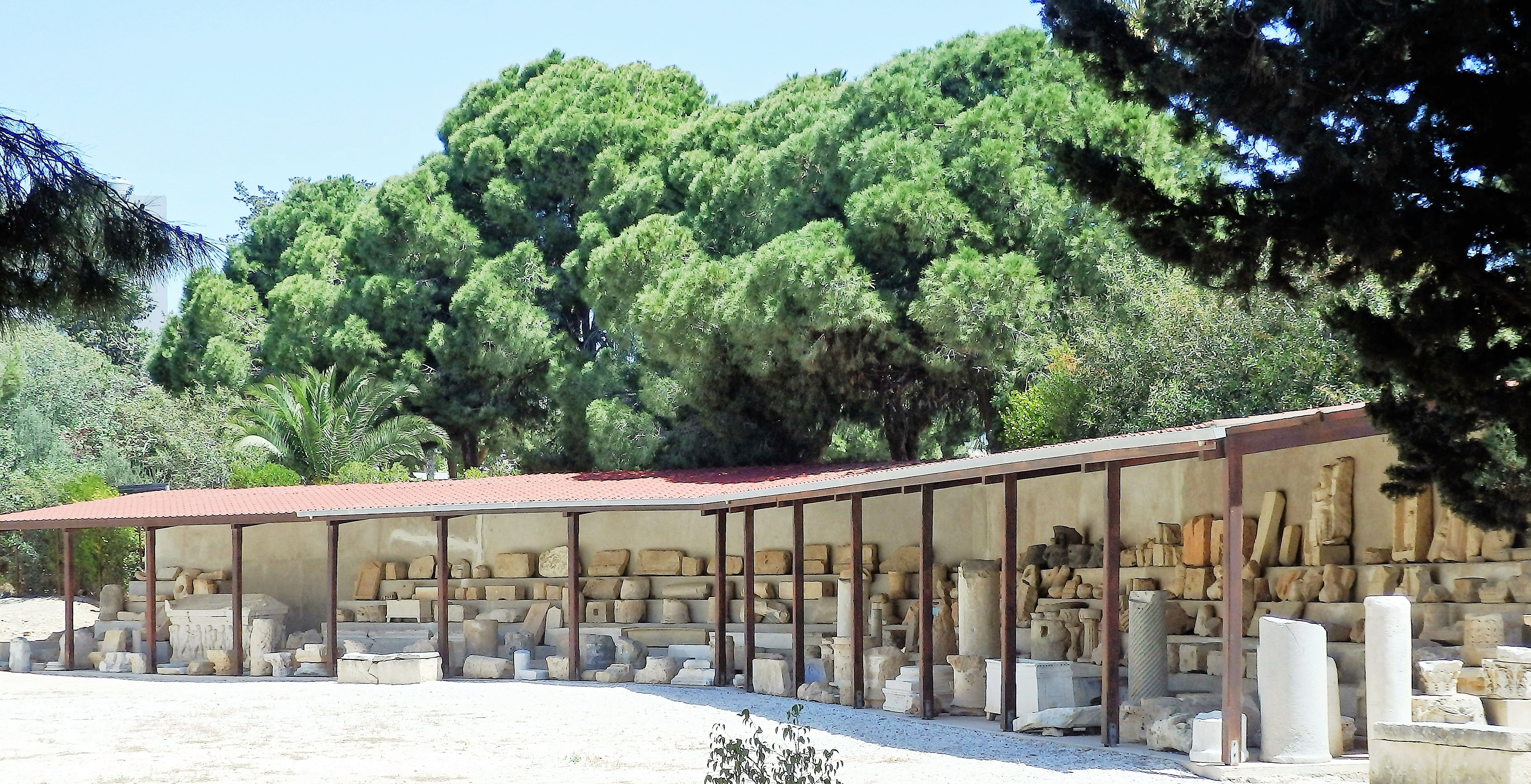 Außengalerie des Archäol. Bezirksmuseums Paphos